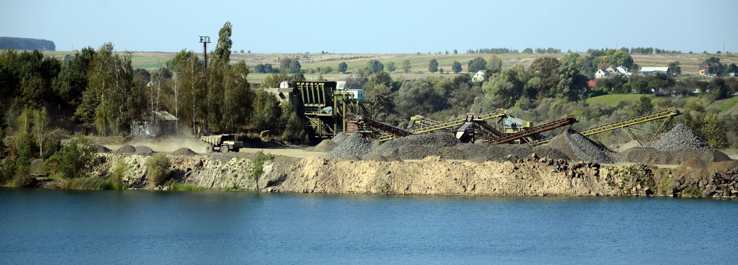 Карьер по добыче базальта в с.Базальтовое